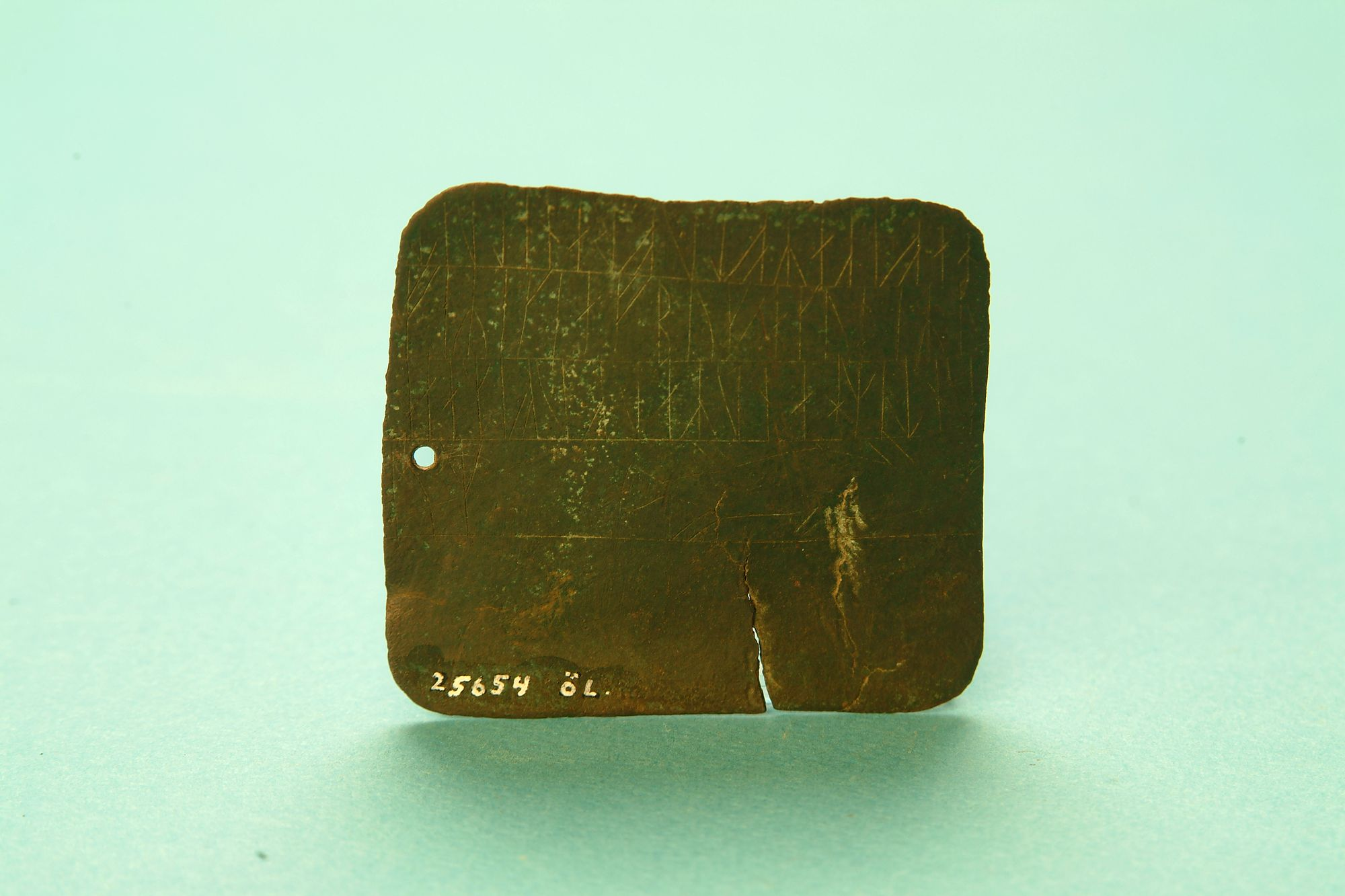 Kvinnebyamuletten